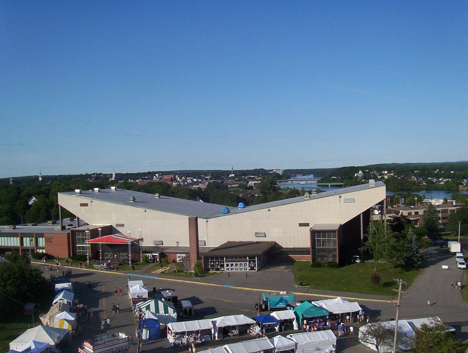 Bangor Auditorium, in Bangor, Maine